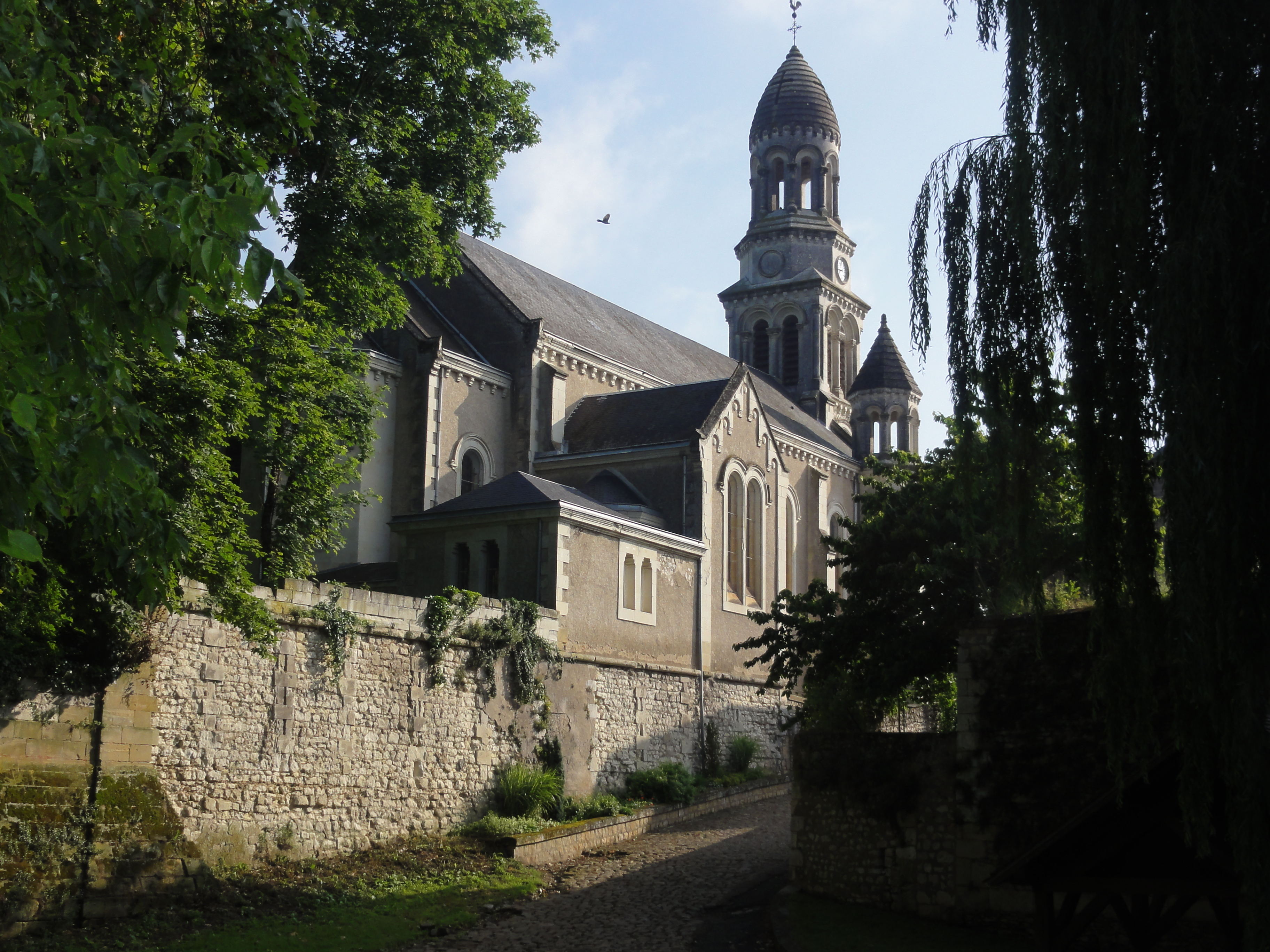 Les Ormes (Vienne) église (2)